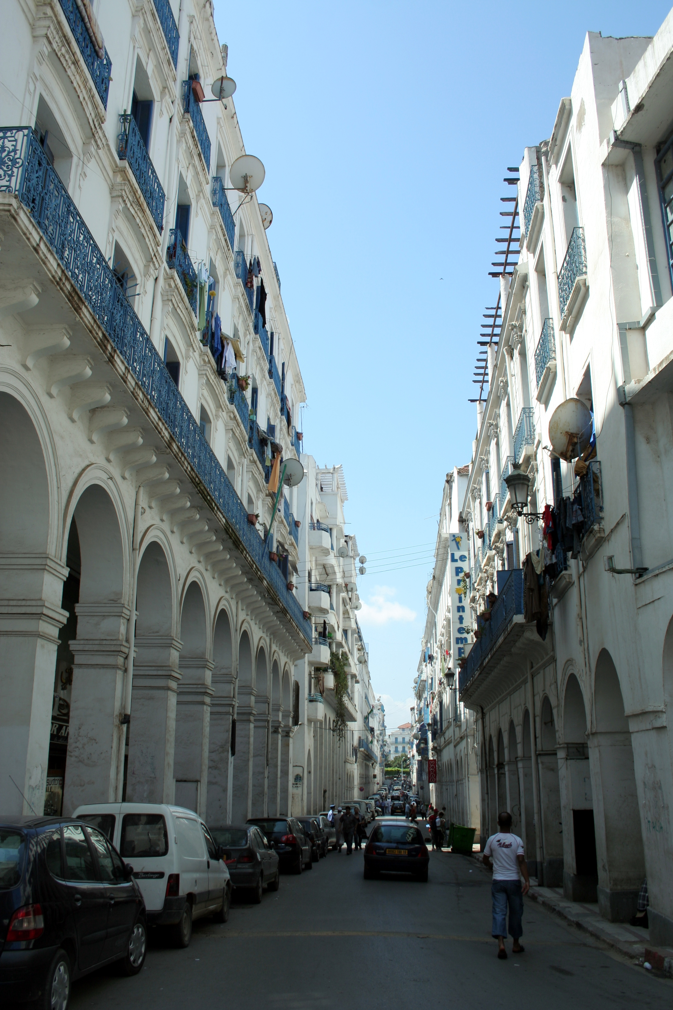 Alger (Algérie), rue Bab Azoun, près de la Place des Martyrs (ex Place du Gouvernement) et en regardant vers le Square Port Saïd (ex Square Bresson).